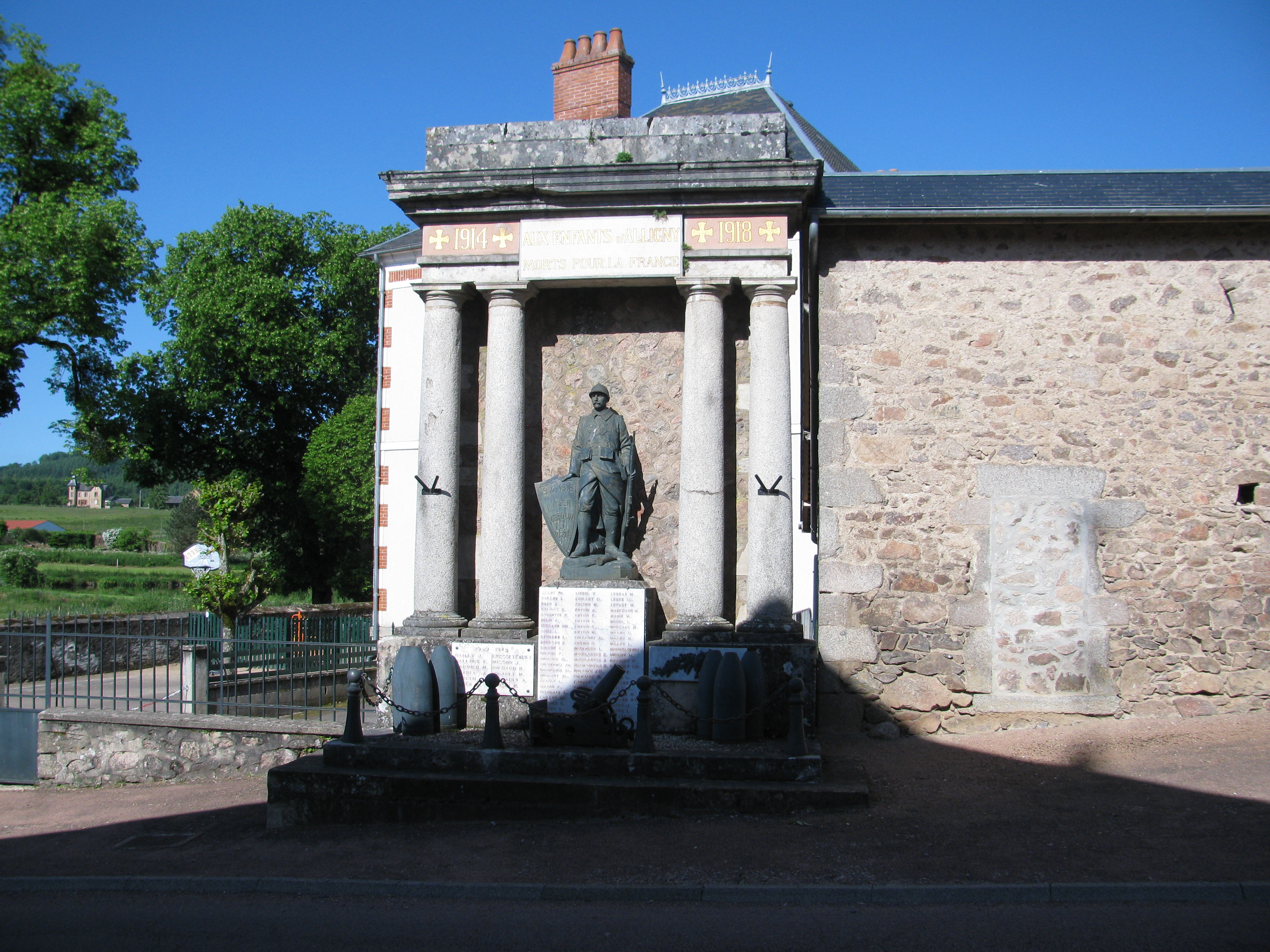 Monument aux morts d'Alligny-en-Morvan, Nièvre, France.